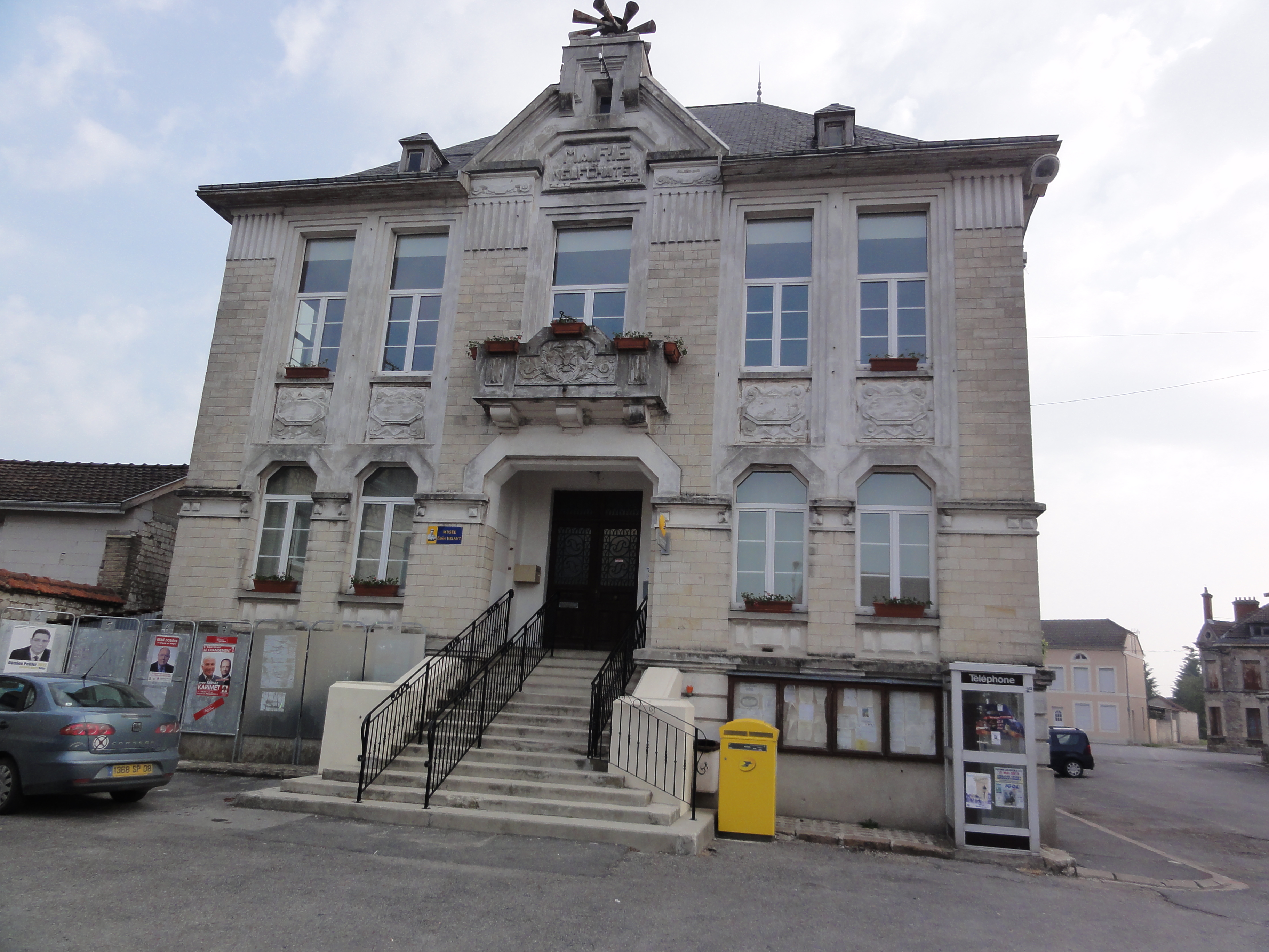 Neufchâtel-sur-Aisne (Aisne) Mairie